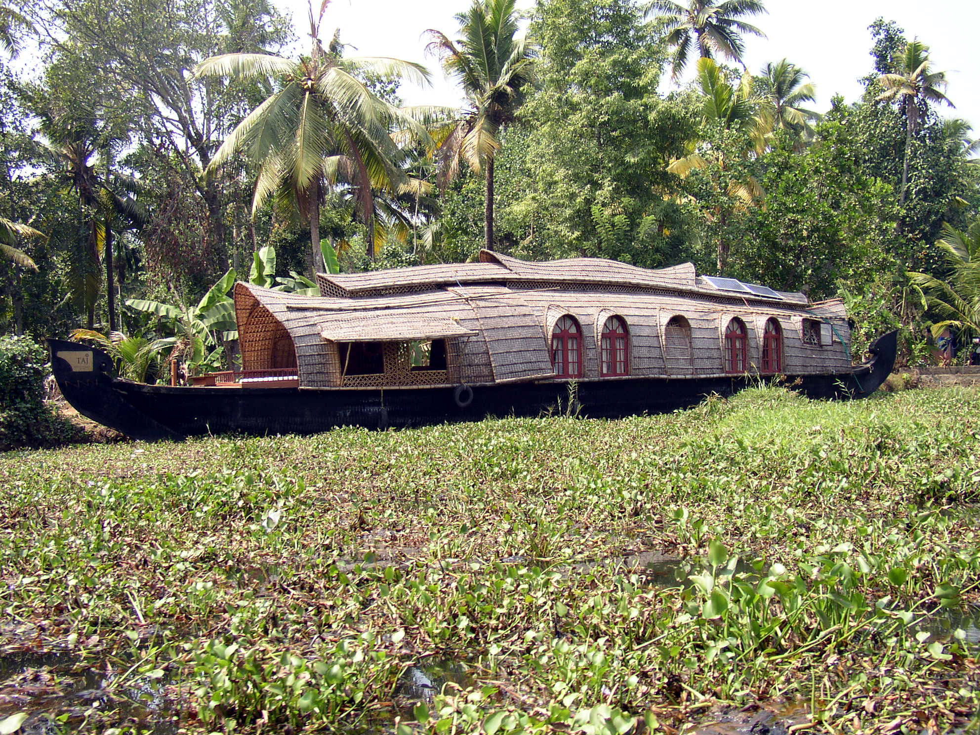 Hausboot auf einem der Kanäle der Backwaters, Kerala, Indien (Ein typisches Touristen-Hausboot in einem stark mit Wasserhyazinthen überwucherten Kanal. Basis dieser Boote sind alte Lastenkähne)